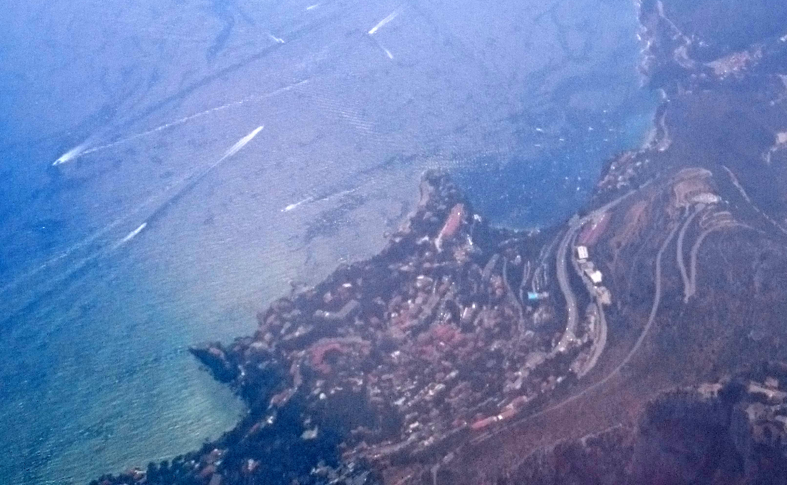 Quartier de la Mala au Cap-d'Ail.